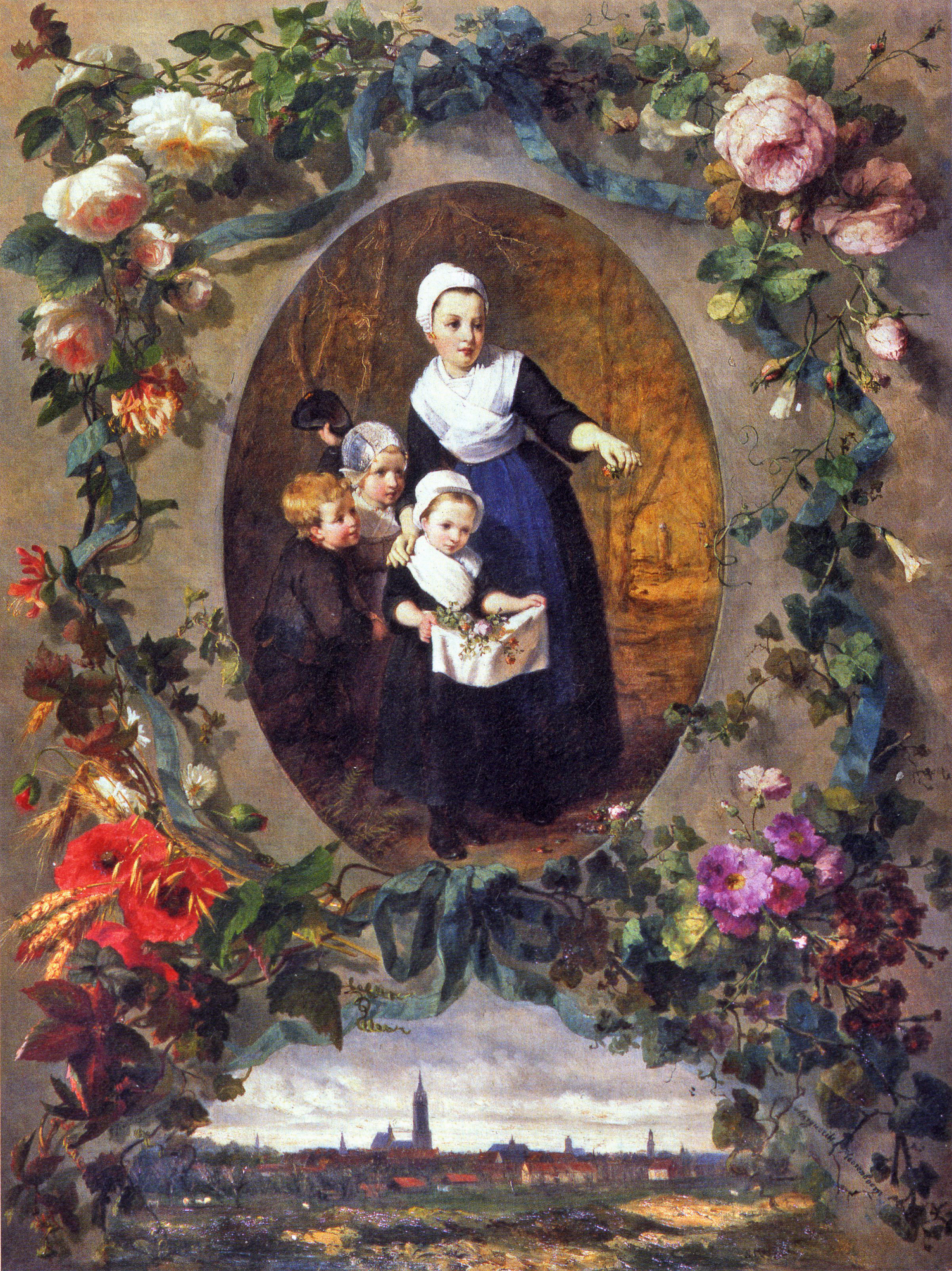 "Haagse Weeskinderen" een schilderij aan geboden aan de toenmalige koningin Sophie en gemaakt door vier schilderessen Bisschop-Swift, Mesdag-van Houten, Roosenboom en Van de Sande Bakhuyzen